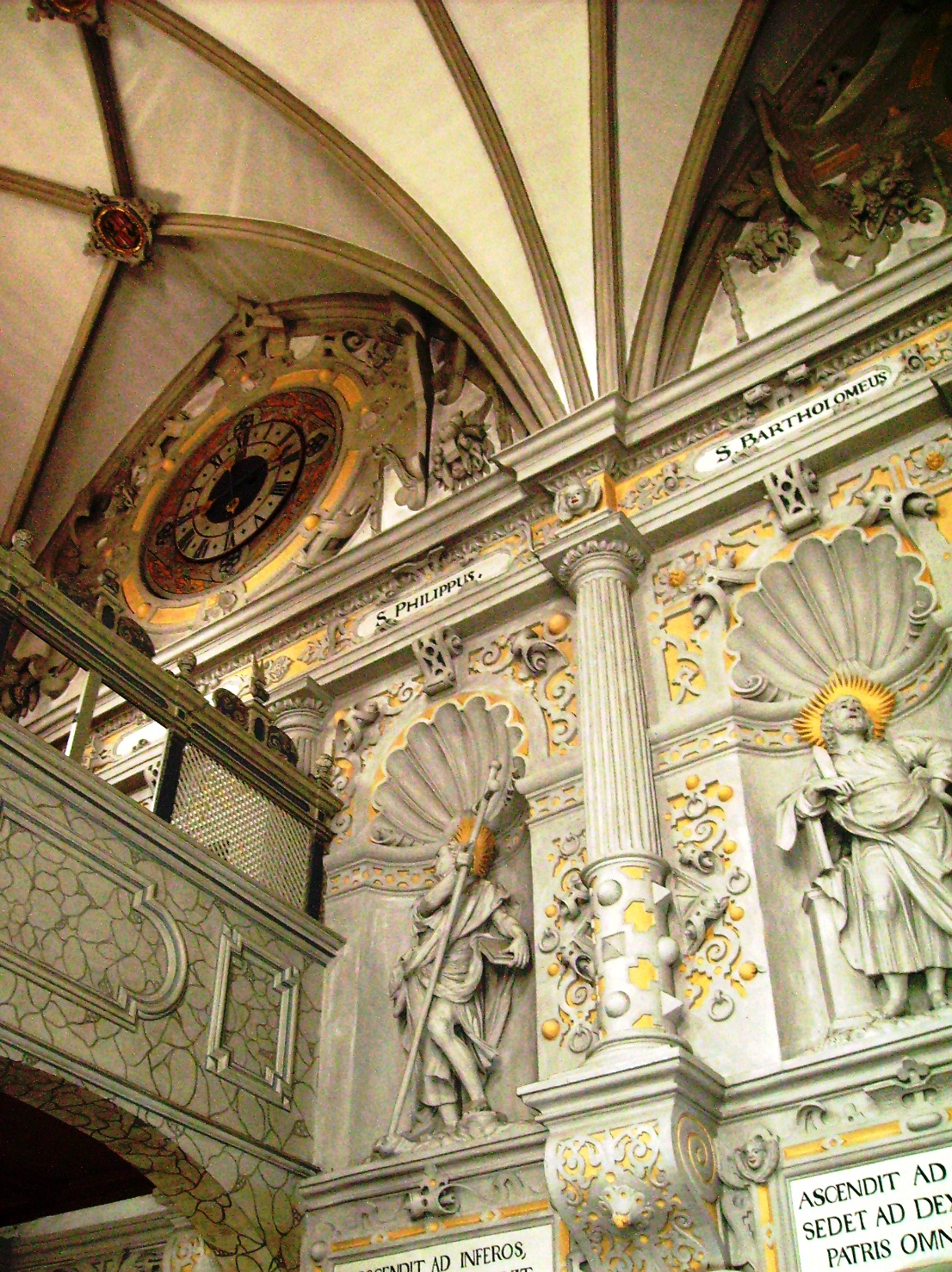 Hechingen, Germany